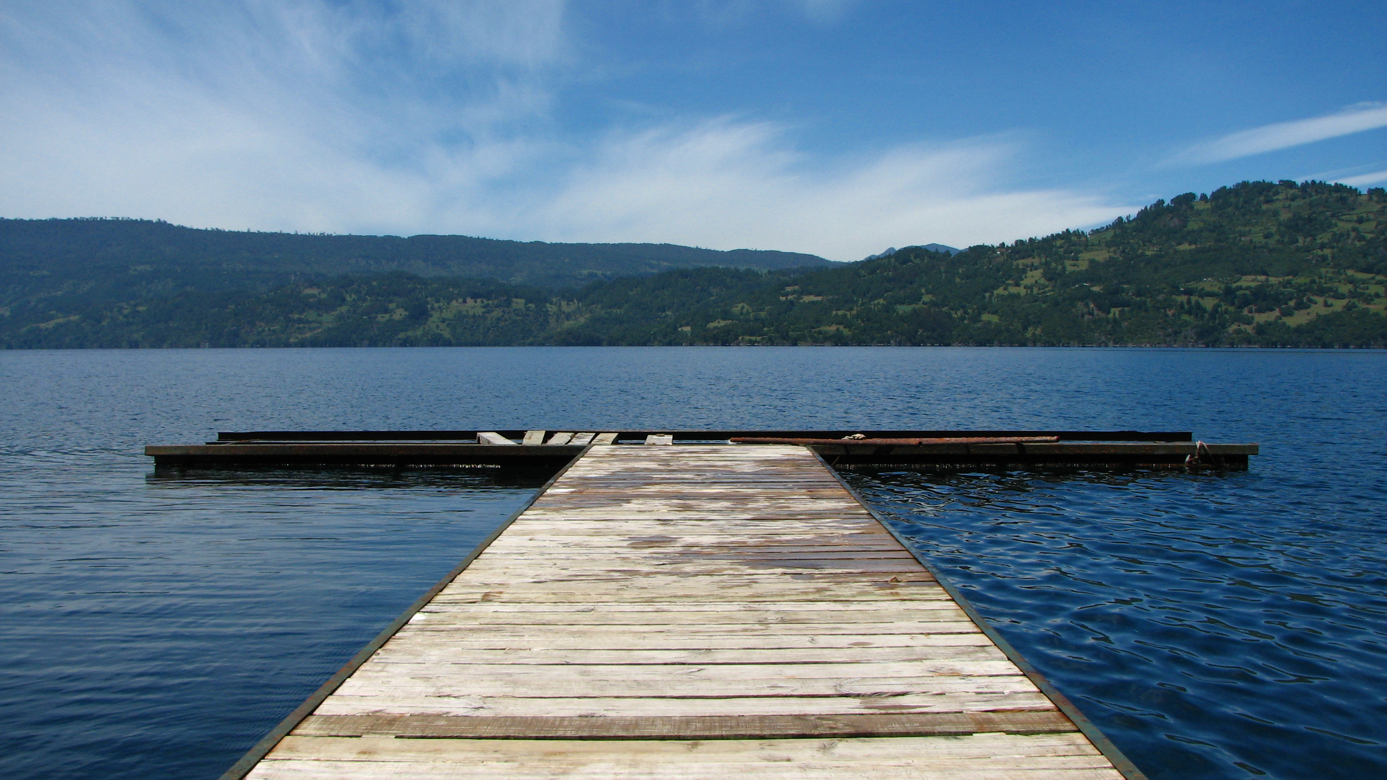 Vista del Lago Calafquén, desde el Camping Calafquén.